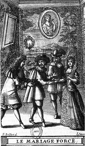 Frontispice de l'édition de 1682.